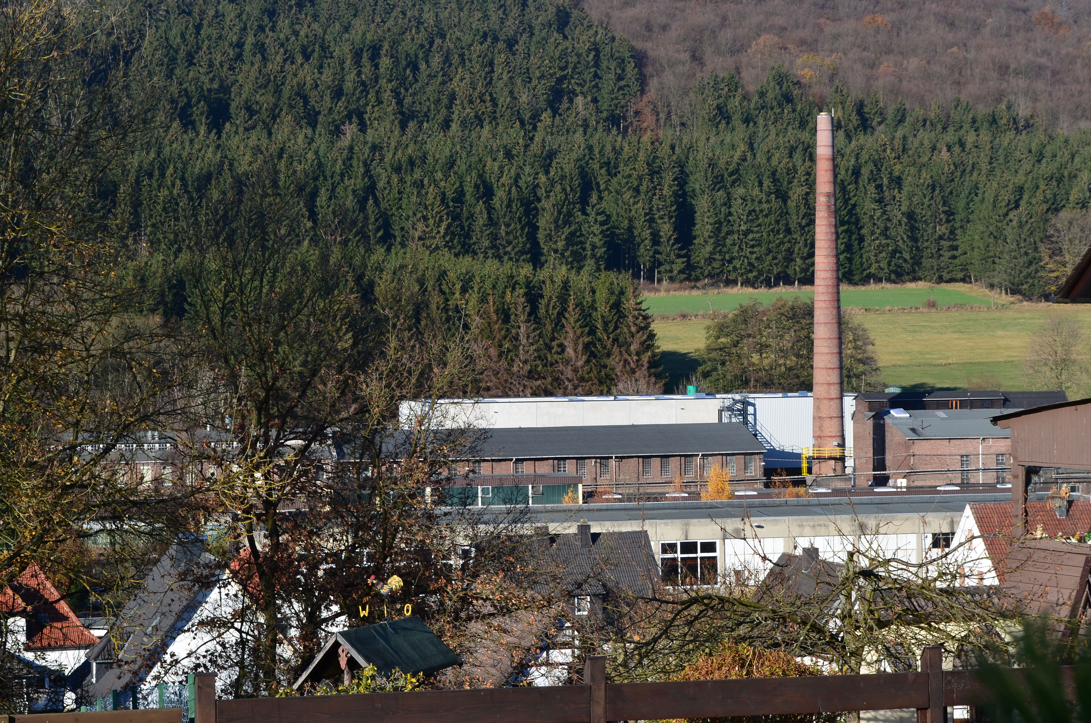 Brilon, Hoppecke, Akku